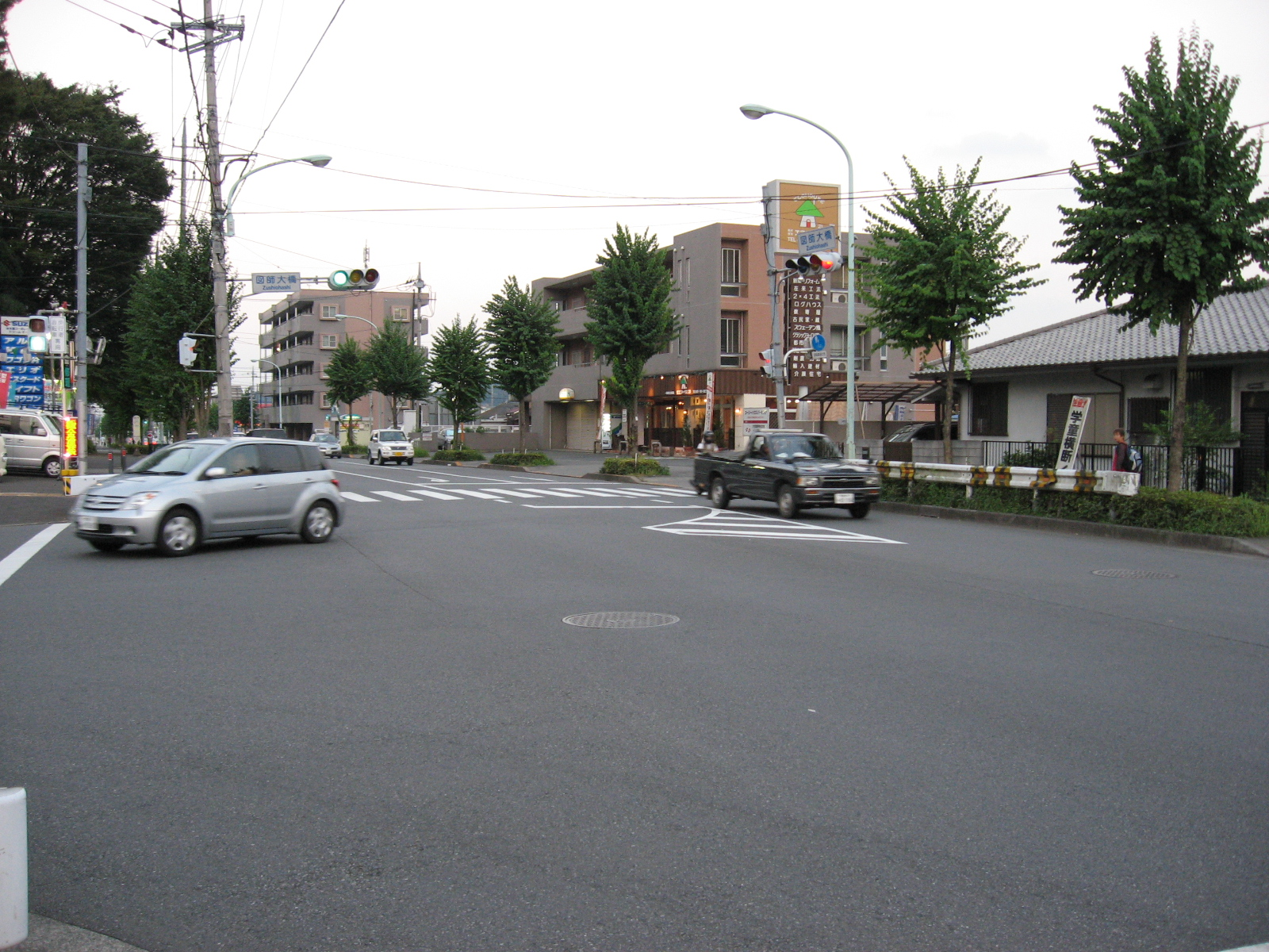 神奈川県道57号線 図師大橋交差点